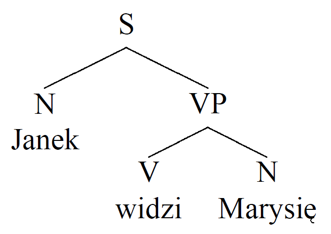 Przykładowe drzewo dla zdania Janek widzi Marysię